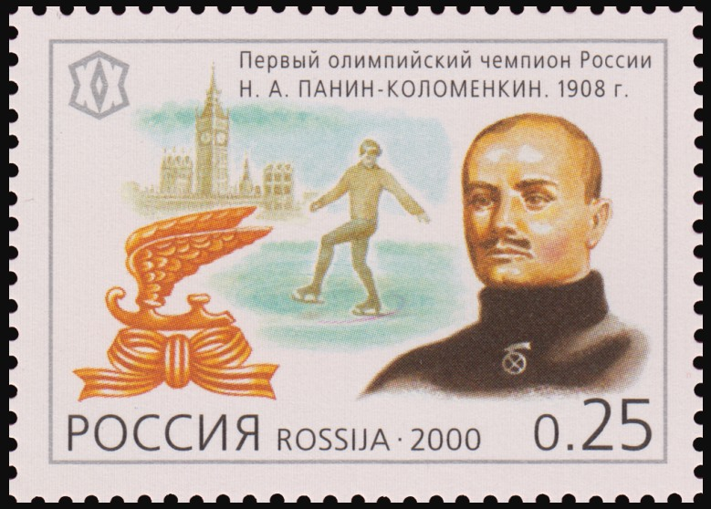 Первый олимпийский чемпион России Н. А. Панин-Коломенкин (1908).